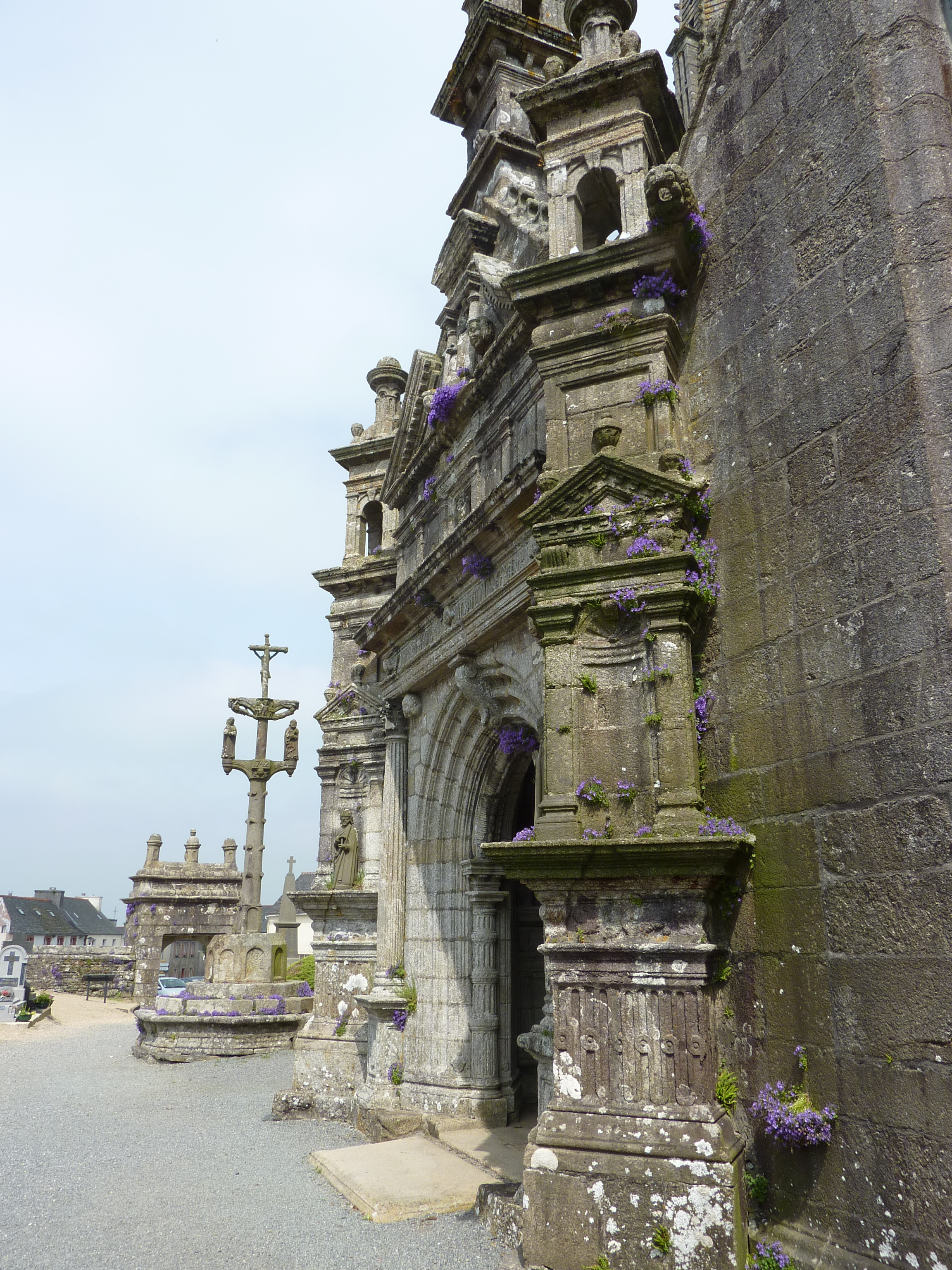 Commana Façade sud de l'église Saint-Derrien détails